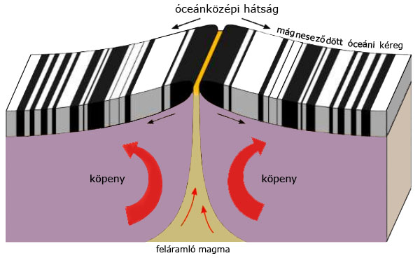 Óceáni hátságok